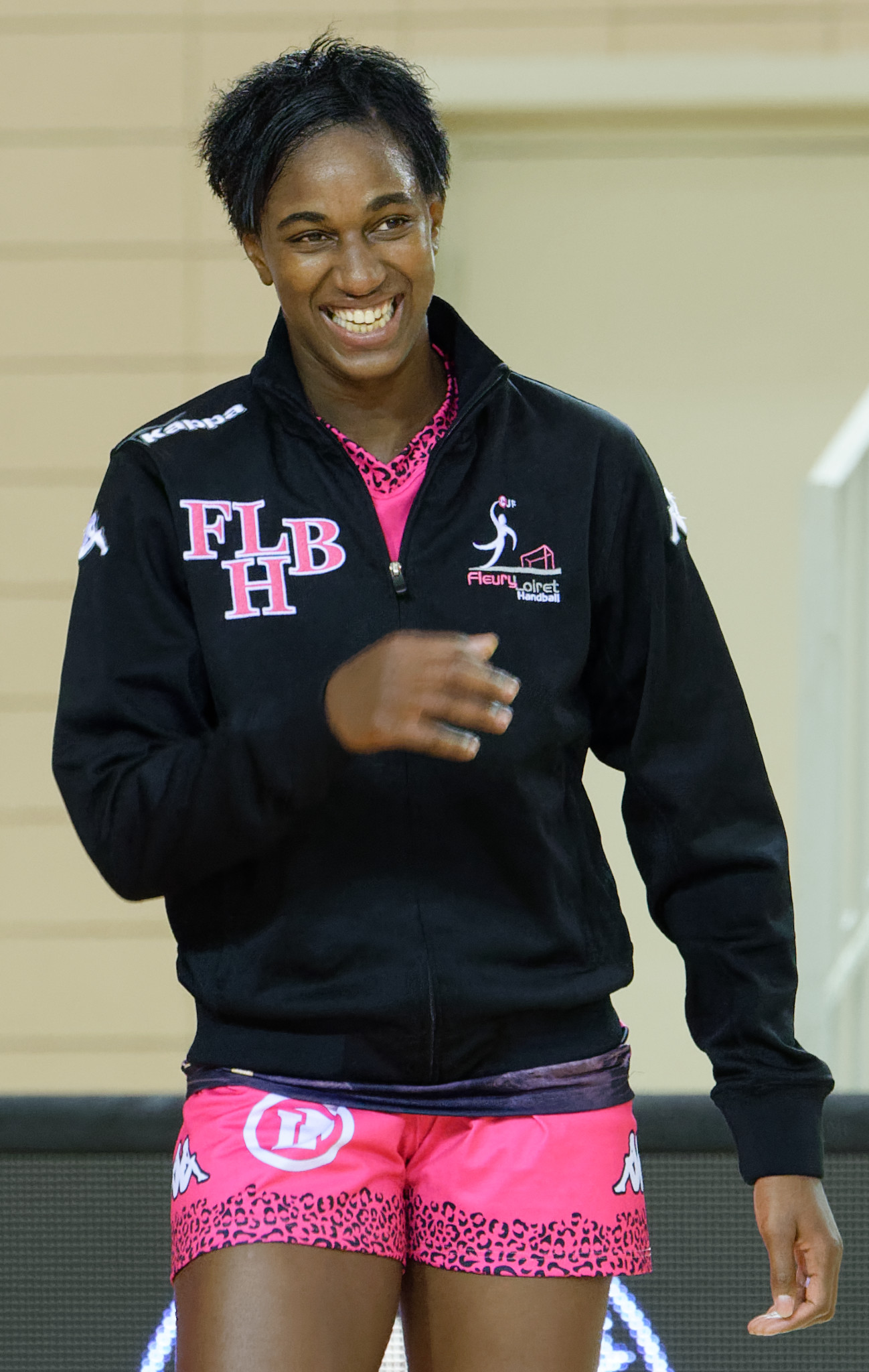 Rencontre de championnat entre Issy Paris Hand et fleury. A Issy Les Moulineaux, le 22 septembre 2015